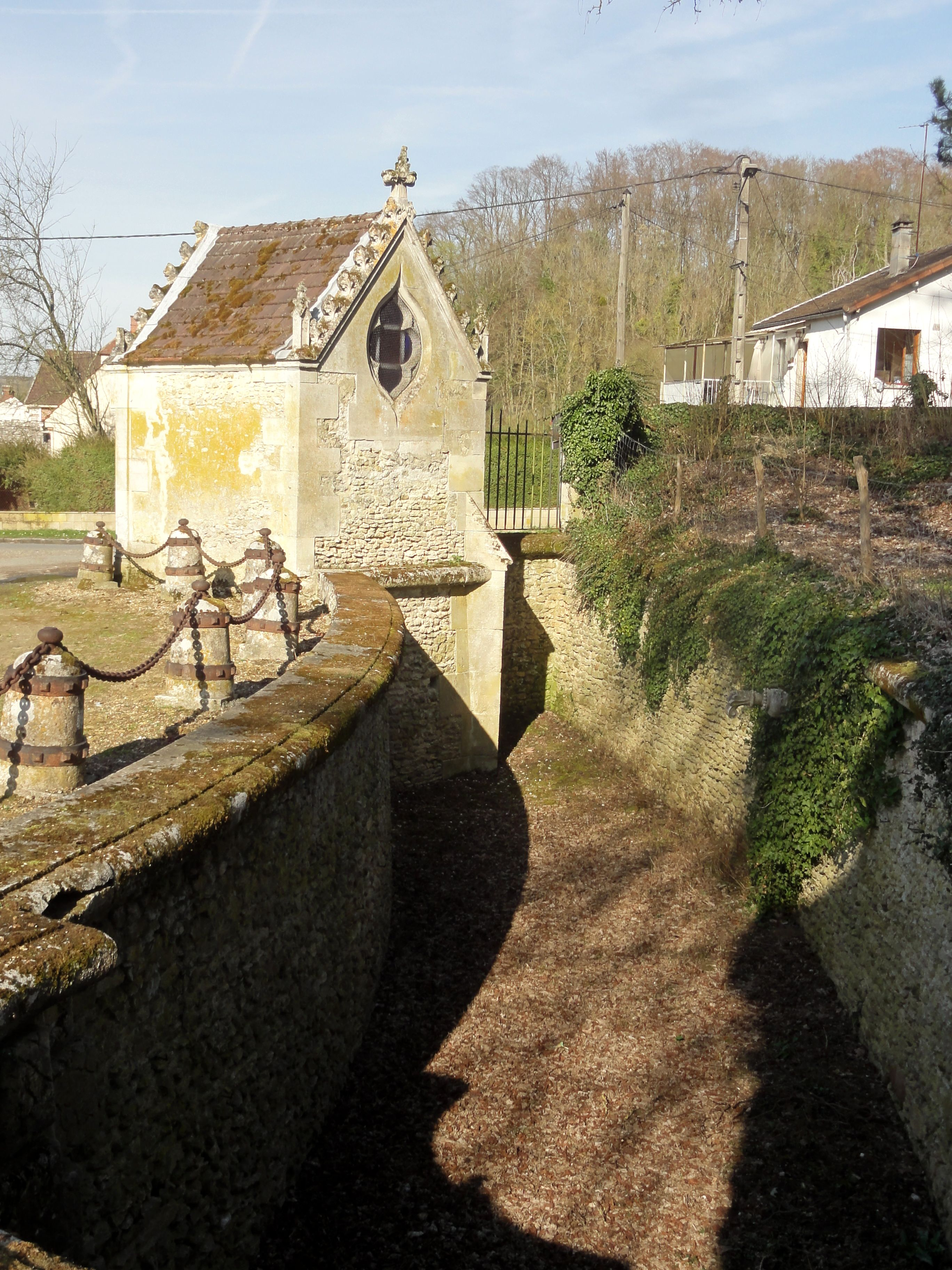 Saut-de-loup côté Heilles.